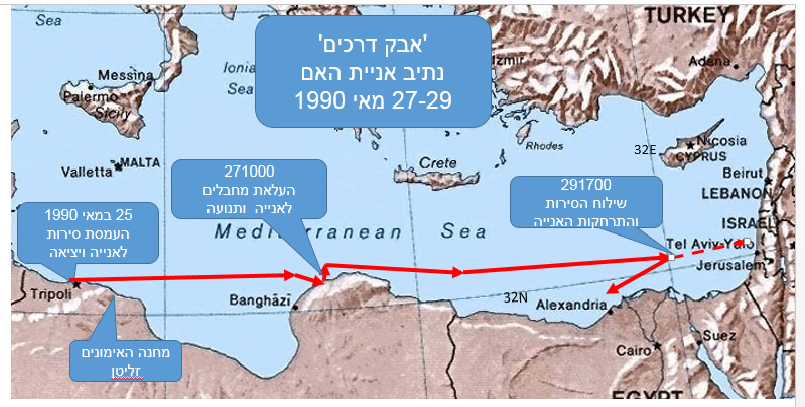 תרשים תנועת אוניית האם של סירות המחבלים לתקיפת החוף הישראלי , מאי 1990.